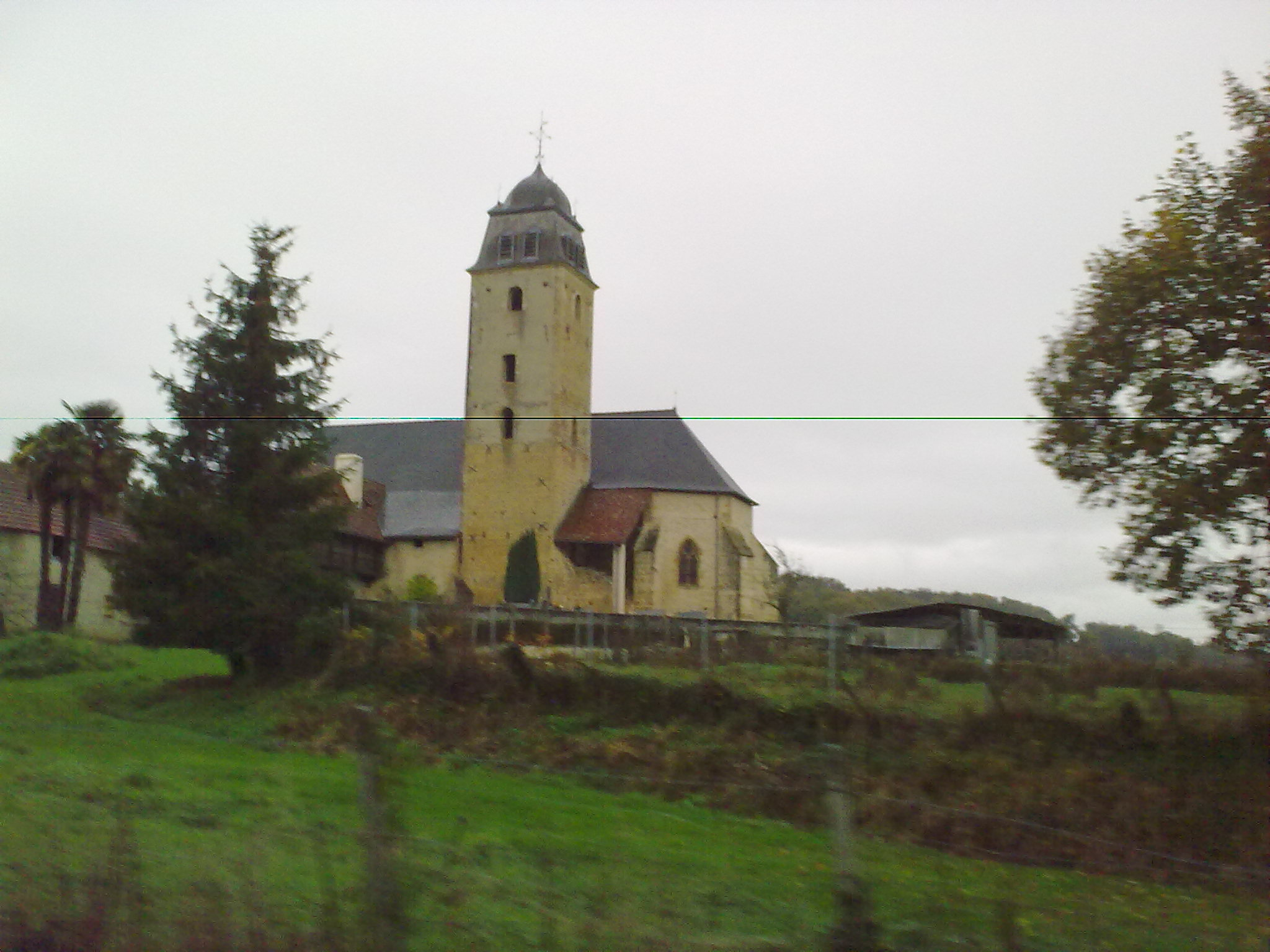 Taron-Sadirac-Viellenave, France.